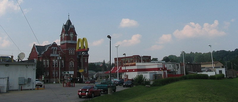 Image taken by me for Wikipedia